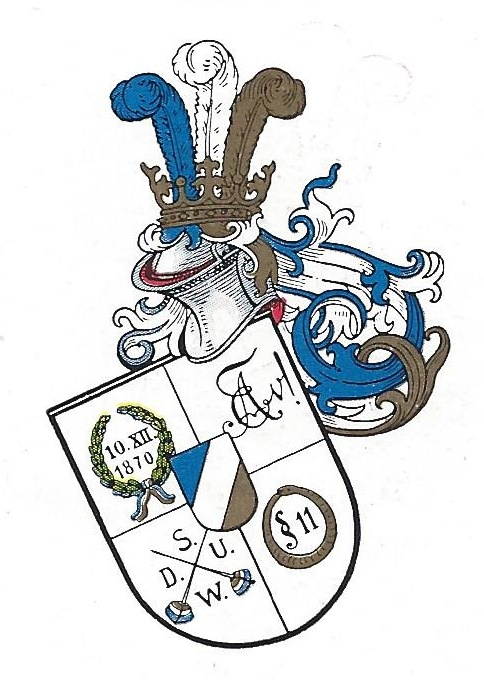 Farbloses Wappen des Corps Austria Brünn